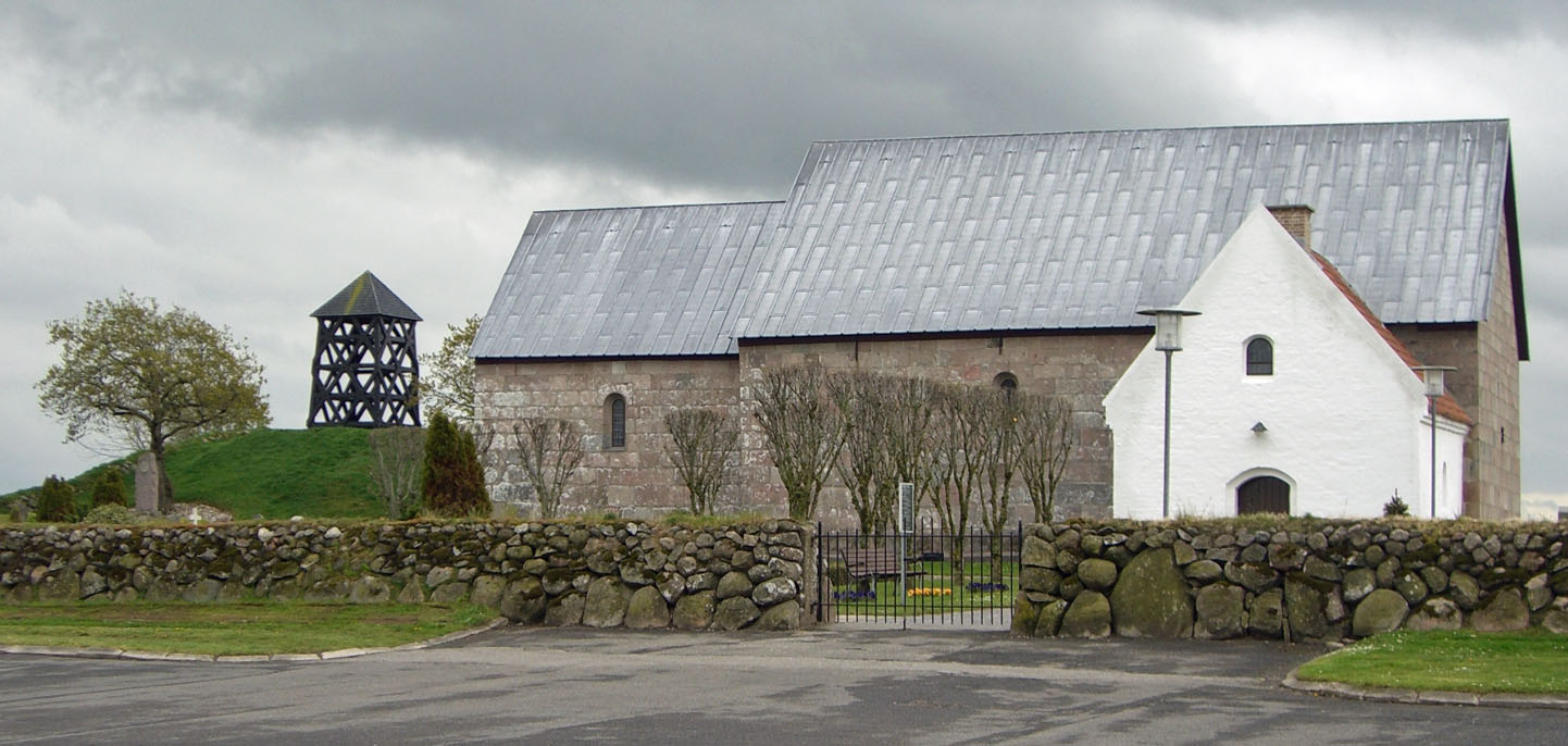 Serritslev Kirke